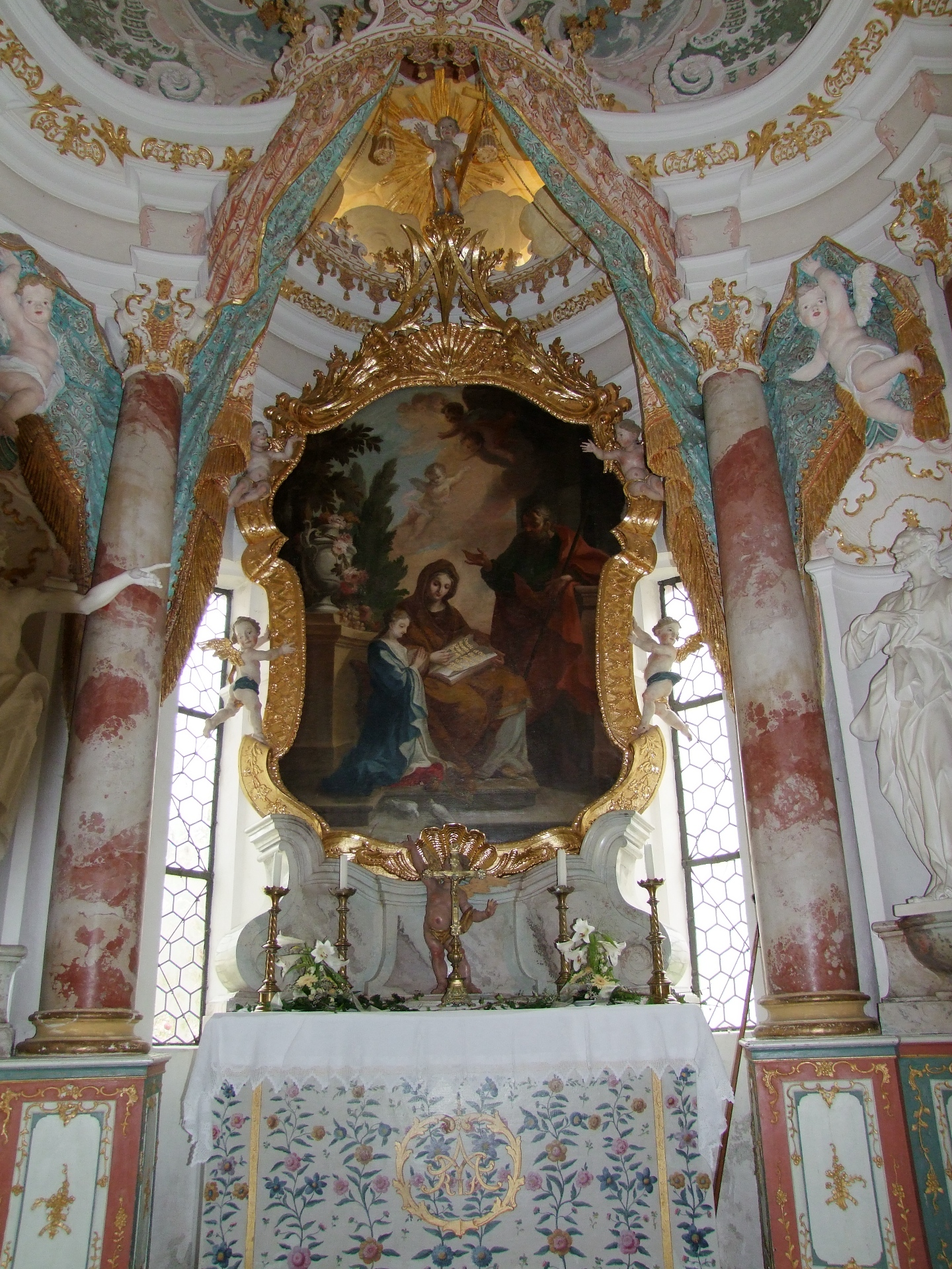 Die St. Annakapelle von Dominikus Zimmermann in der Kartause zu Buxheim